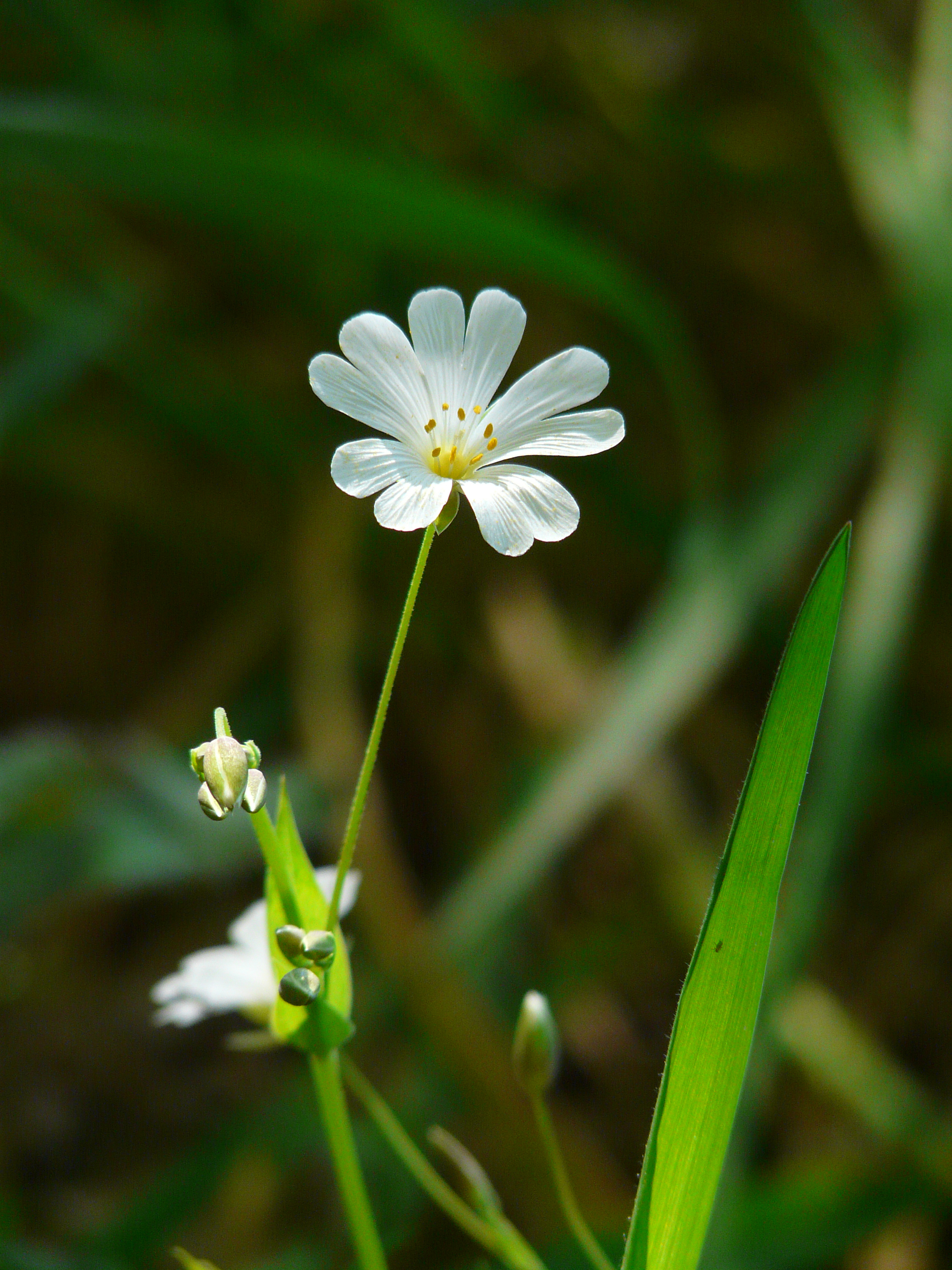 Exemplar de Stellaria holostea fotografado nas brañas de Brins (Santiago de Compostela)